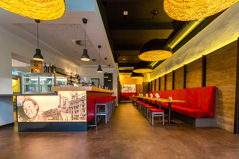 Die Jugendherberge Dortmund wurde in 2015 modernisiert.